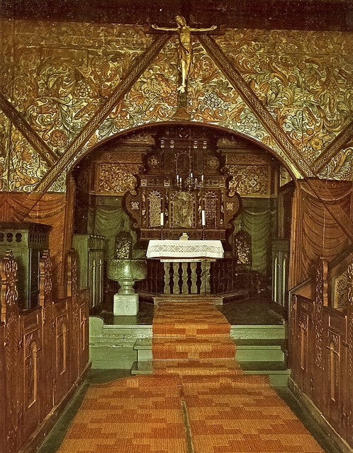 Røldal stavkyrkje, mot koret. Det kjende krusifikset heng over korbogen en: Røldal stave church